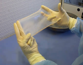 Muestra de piel para trasplante en cámara de flujo laminar. Author: Fernando da Rosa